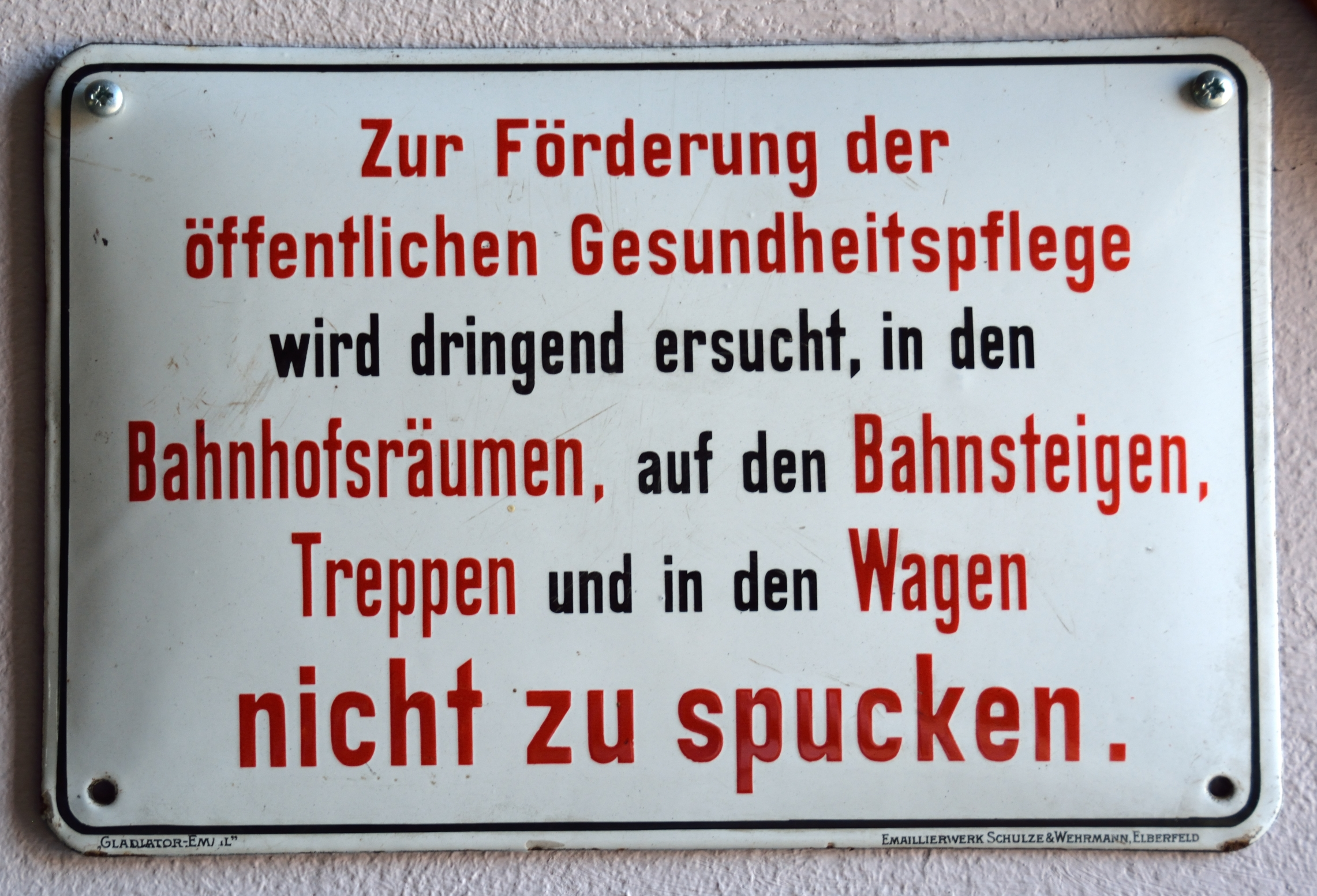 Hinweisschild aus Email, Datum unbekannt, "Gladiator-Email", "Emaillierwerk Schulze & Wehrmann, Elberfeld"